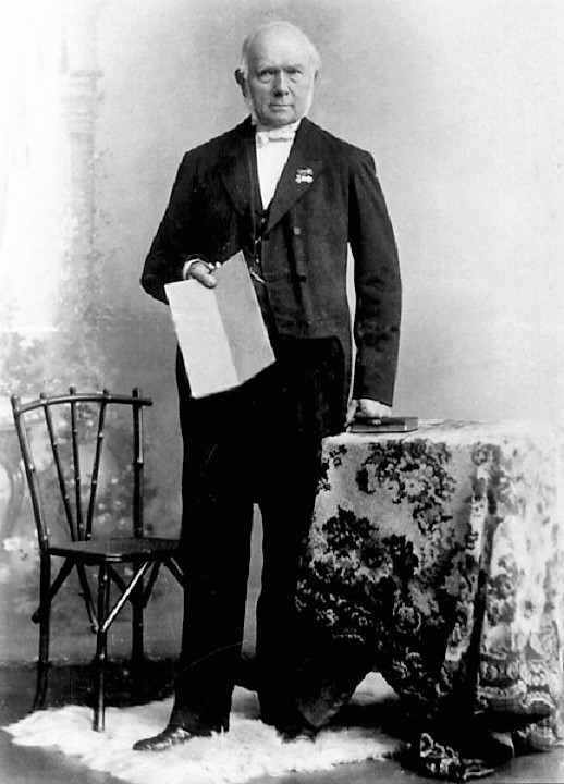 Ludwig Polscher (* 1820 in Hohenlimburg, † 1909 in Unna) war ein evangelischer Geistlicher und Präses der Evangelischen Kirche von Westfalen (1874–1902). Sohn des Hohenlimburger Gastwirts (Gasthof zur Post) und Postexpedienten Christian Polscher und seiner Ehefrau Maria Charlotte geb. Bauer. – Ludwig Polscher gründete 1846 in Hohenlimburg die „Höhere Privat-Schul-Anstalt“ und war deren Leiter bis er Anfang 1852 die ihm angebotene offene Stelle des Pastors in Lünern übernahm.